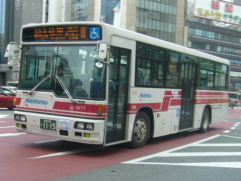 登録番号 福岡200か11-15 西日本鉄道柏原自動車営業所所属 車番9277 2007年4月30日 天神北交差点にて撮影